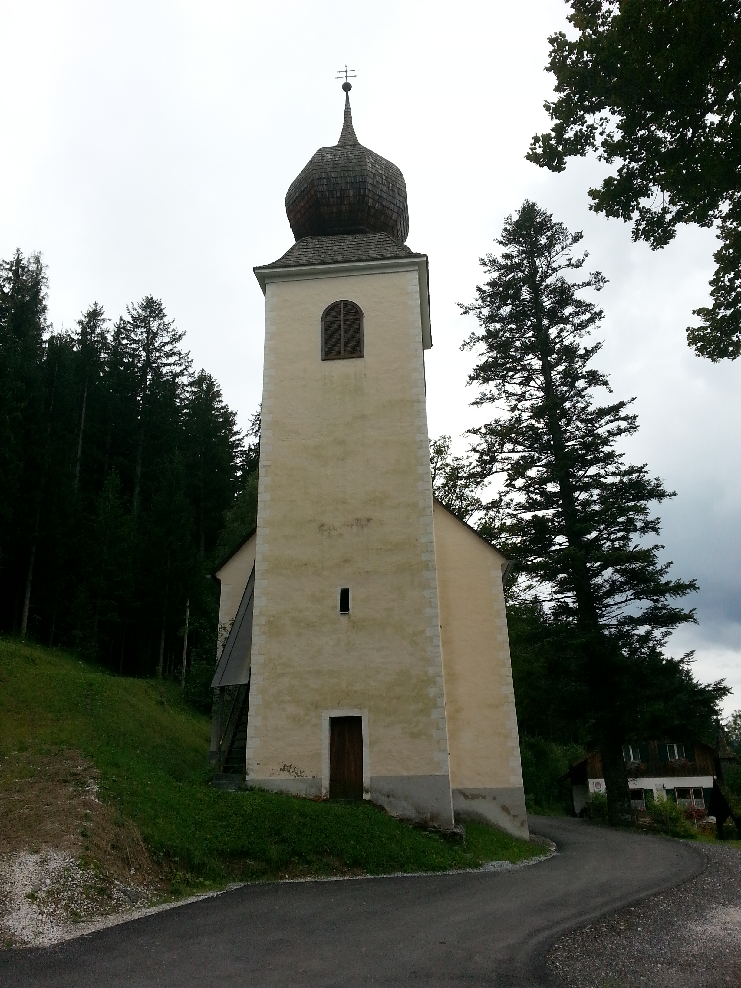 Kath. Filialkirche St. Radegund am heiligen Wasser